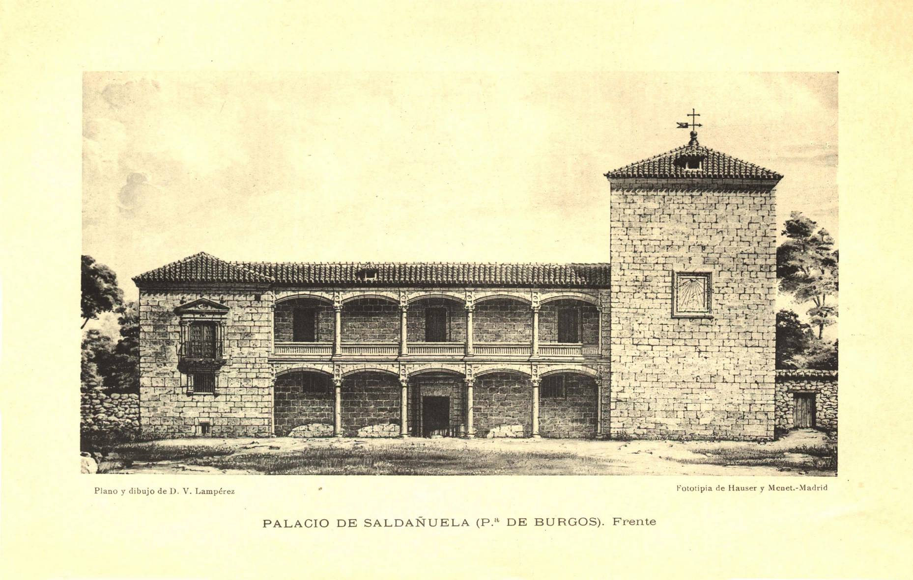 Frente del palacio de Saldañuela. Dibujo de Vicente Lampérez y Romea (1914)